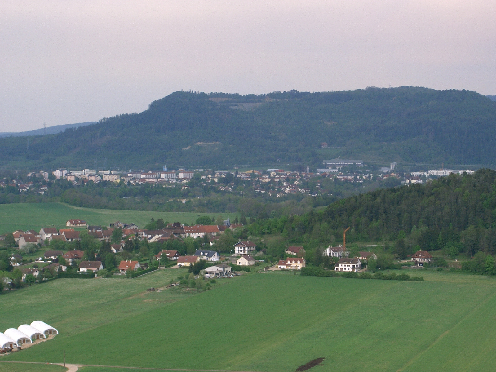 Village de Ney proche de Champagnole, avec le mont Rivel à l'arrière-plan ( Jura - France)